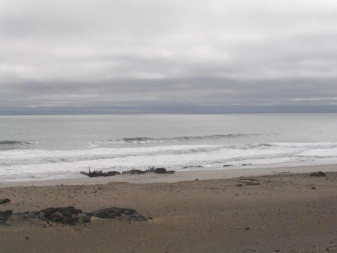 Fotografia da Costa dos Esqueletos, tirada por Muriel Gottrop em Setembro 2004